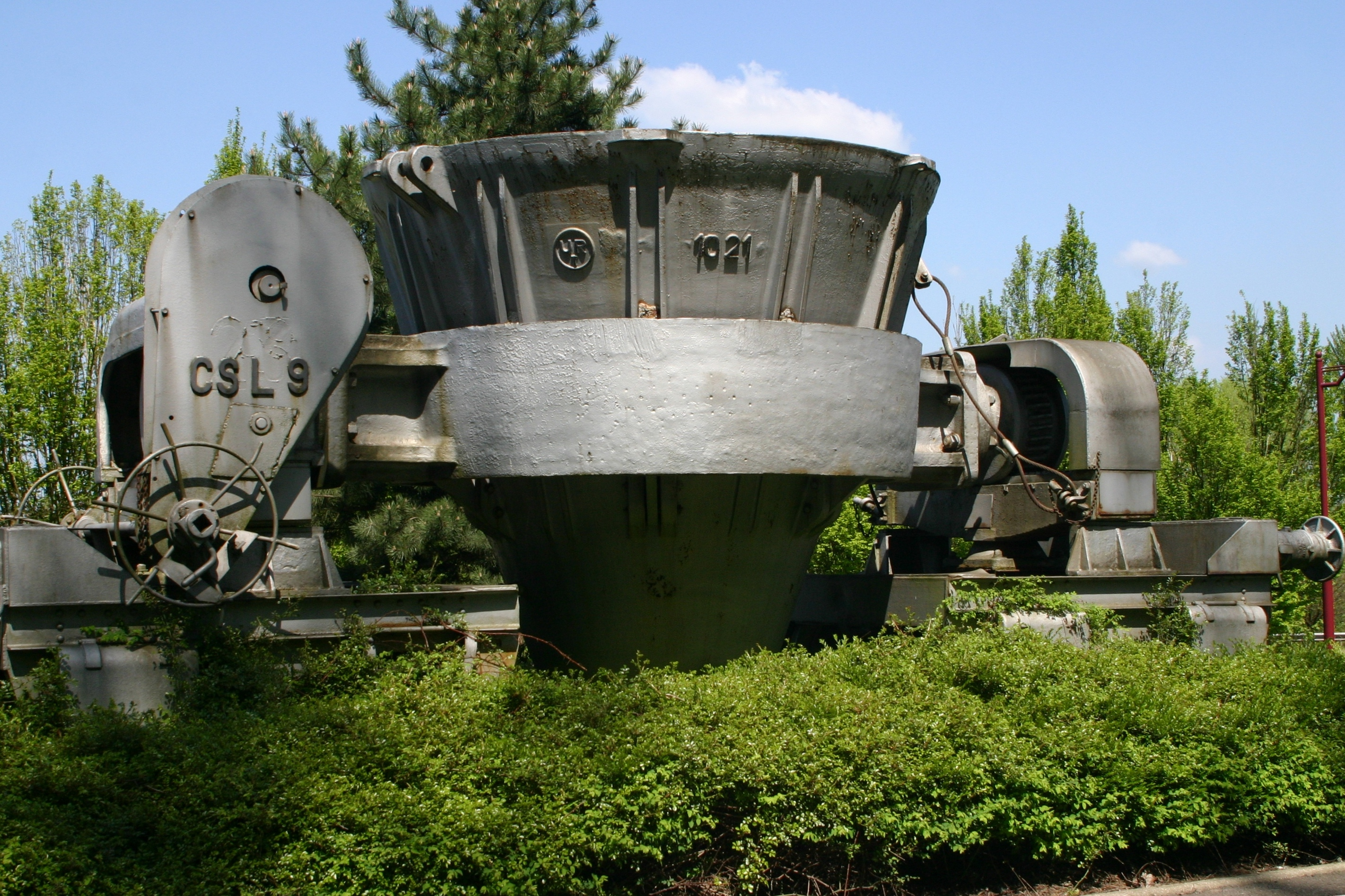 En Humpe fir Schlakentransport.